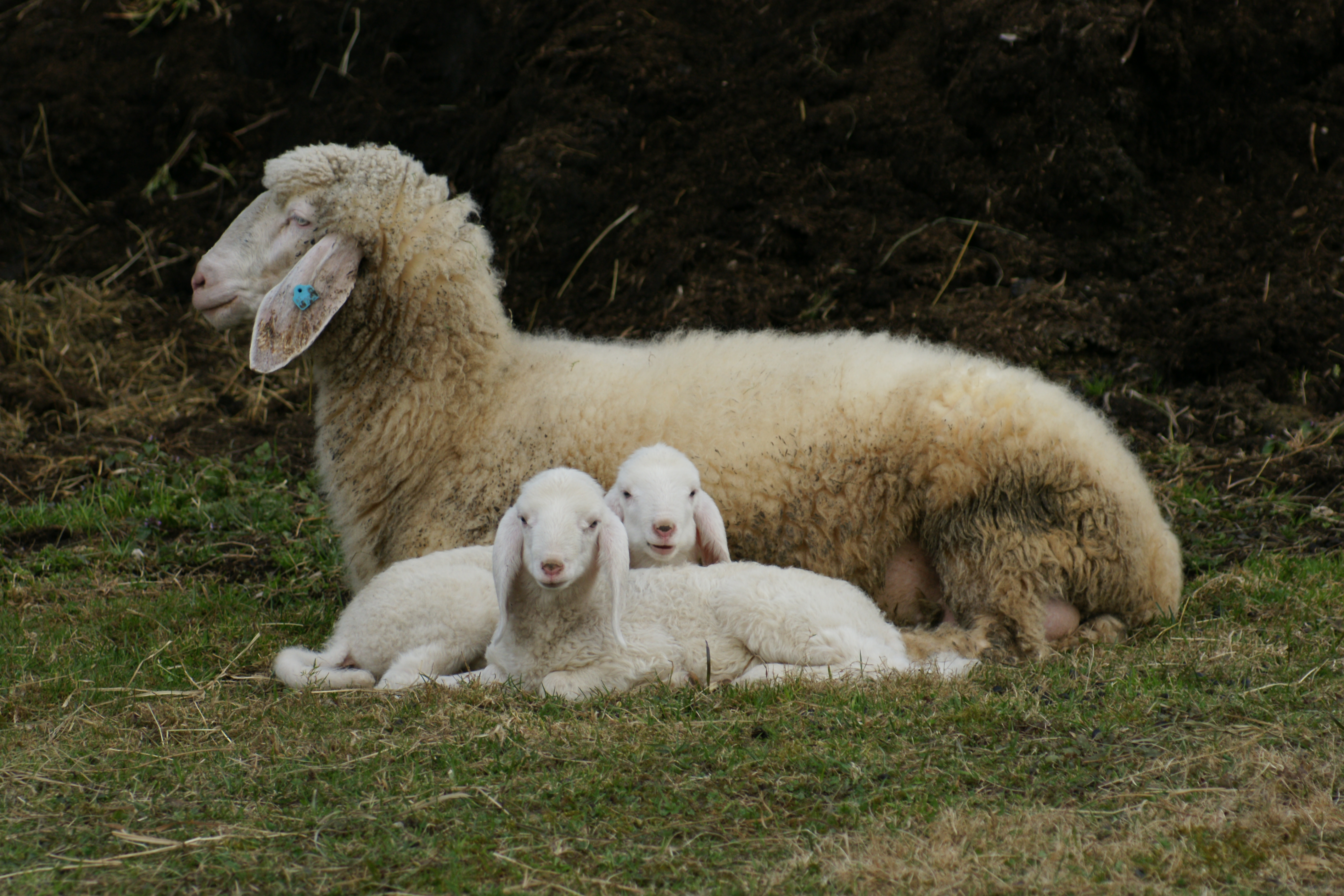 Das Tiroler Bergschaf ist ein mittelgroßes bis großes Schaf mit schmalem, geramstem, auf der Stirn bewolltem, hornlosem Kopf mit langen, flachen Hängeohren (Mundwinkel).*** Gesehen in Achenkirch am Achensee.